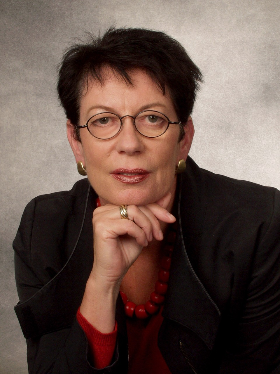 Portrait Sibylle Knauss